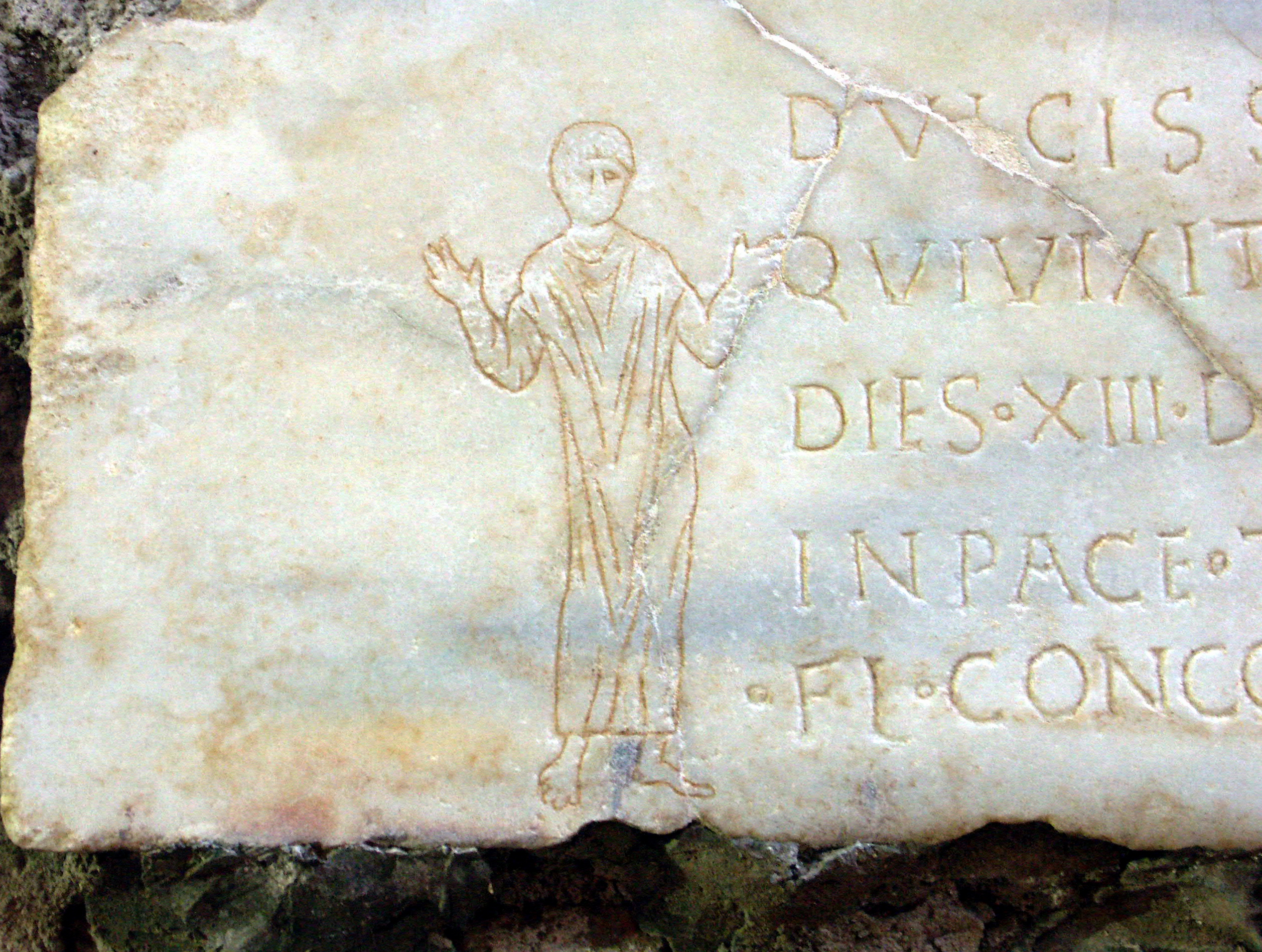 Rom, Domitilla-Katakomben, Steintafel mit Inschrift und Orant (Mensch in antiker Gebetshaltung mit erhobenen Armen)